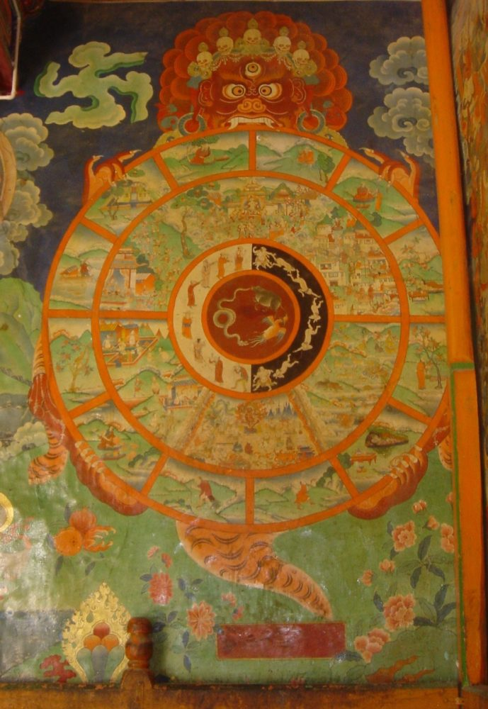 Tibetan chakra